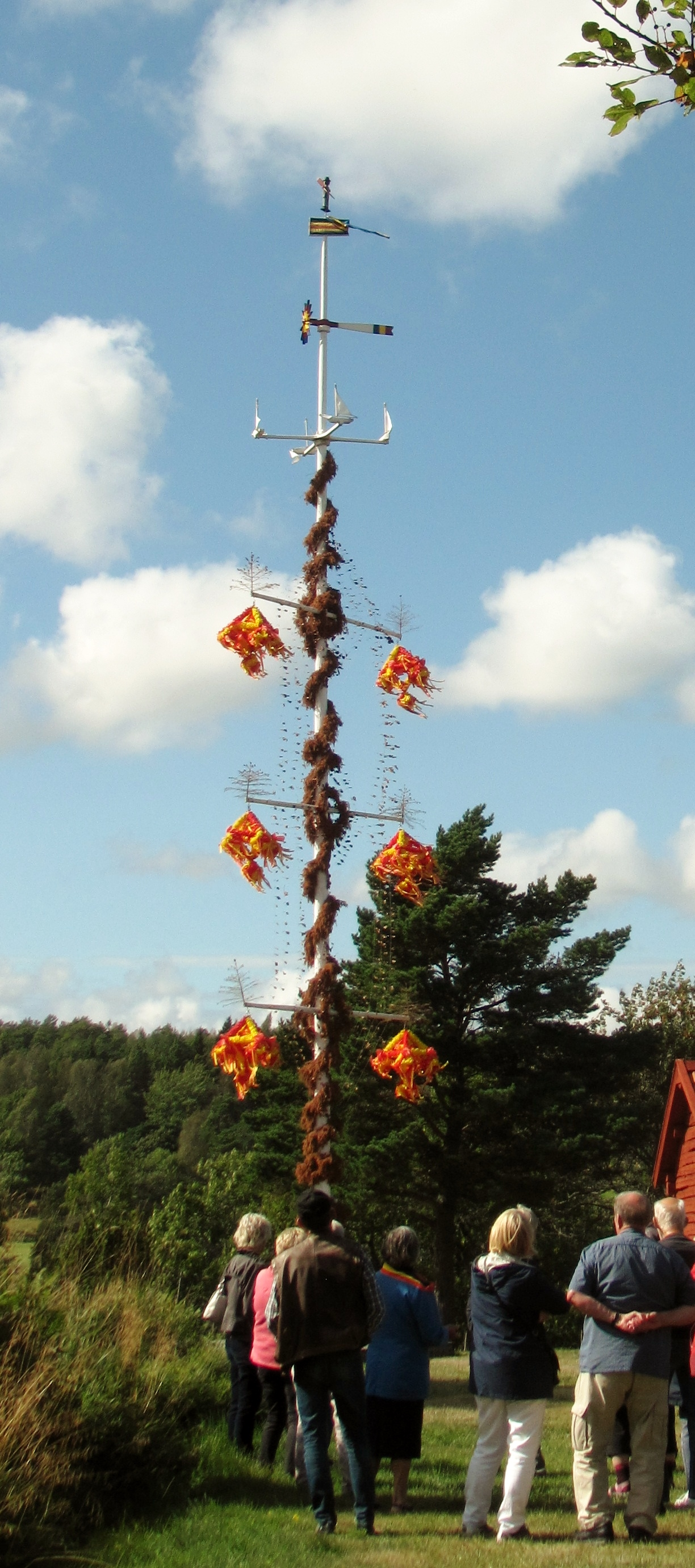 Midsommarstang im Freilichtmuseum am Schloss Kastelholm, Gemeinde Sund, Fasta Åland, Finnland